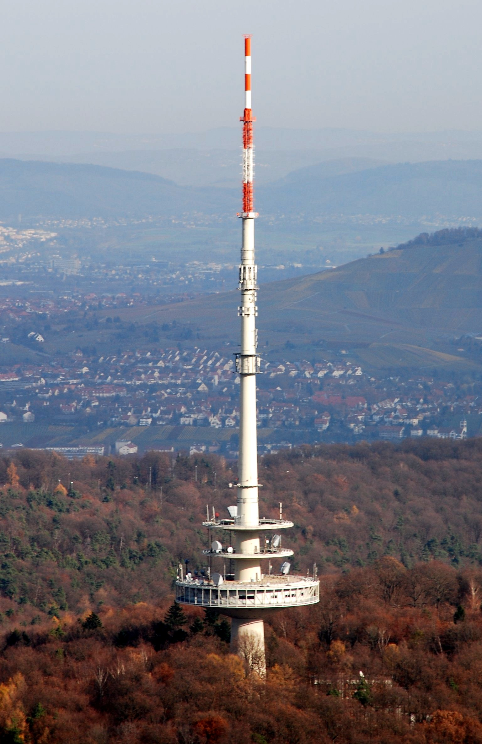 Fernmeldeturm Stuttgart auf dem Frauenkopf